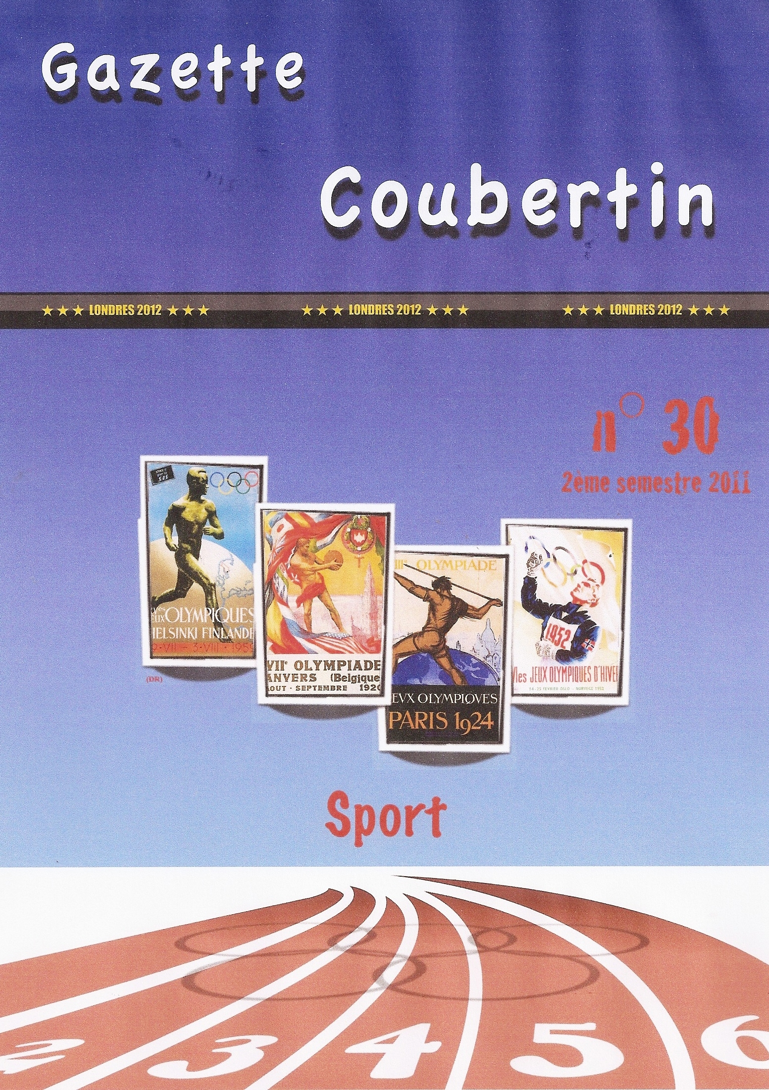 Couverture du bulletin du Comité français Pierre de Coubertin